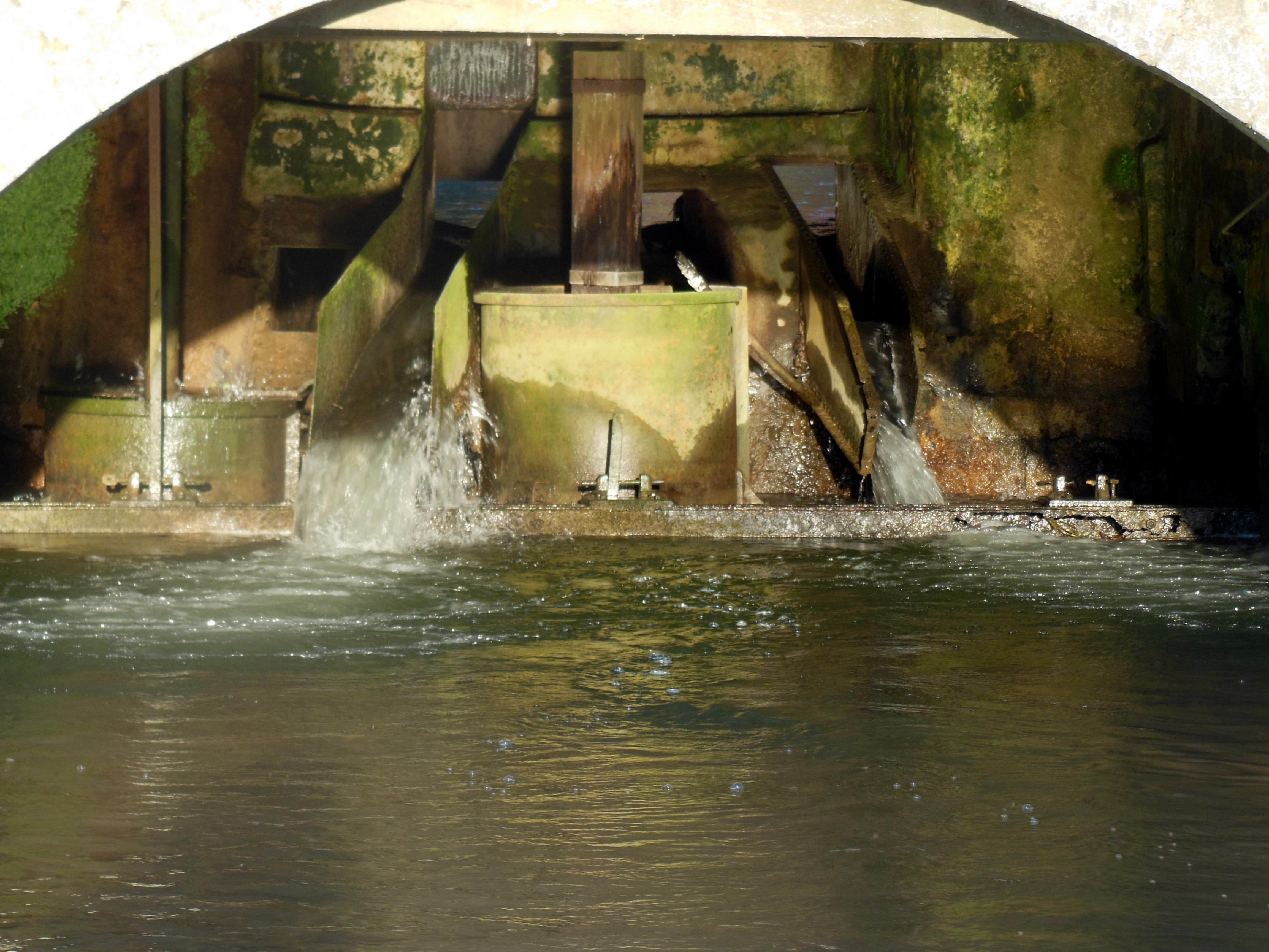 Mécanisme du moulin à eau de Poyaller (Saint-Aubin, Landes, France)